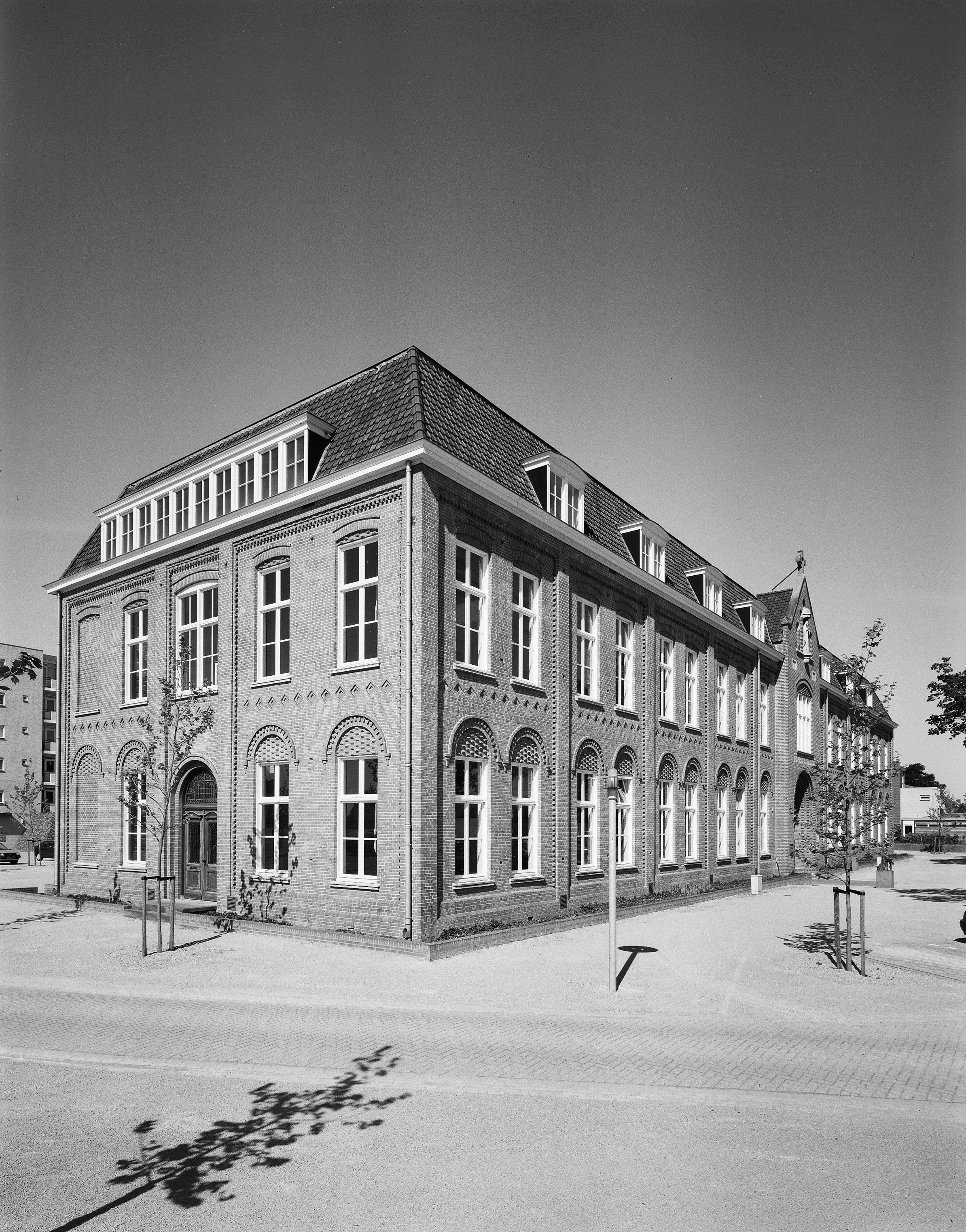 Rooms-Katholieke Kweekschool Maria Immaculata: Overzicht voorgevel en linker zijgevel (opmerking: Gefotografeerd voor Monumenten In Nederland Limburg)